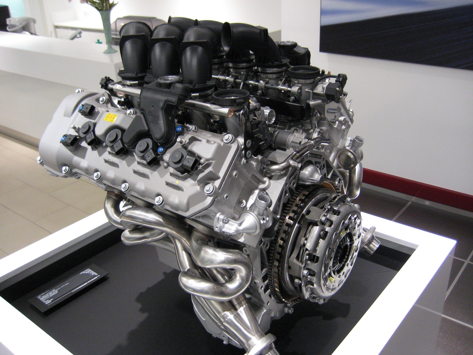 BMW S65 4.0L V8 Engine Model